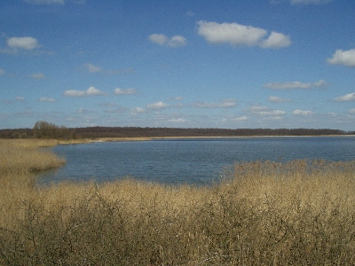 Bildbeschreibung: Galenbecker See Fotograf: Bolle Lehmann Datum: 15.04.2006 Sonstiges: public domain